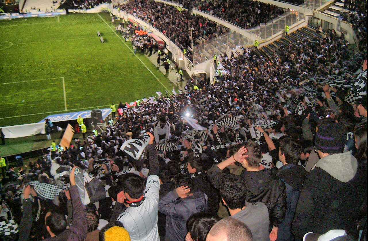 Supporters de Beşiktaş JK lors du matche contre Gençlerbirliği le 14.3.2009